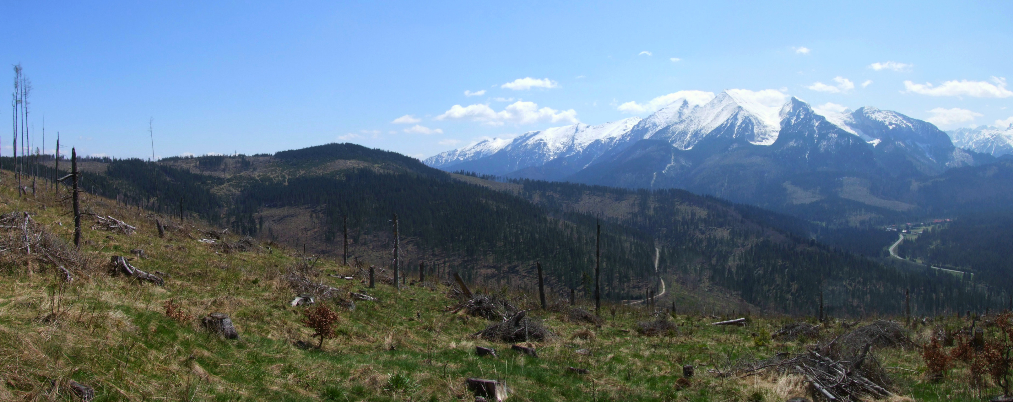 pl. Rzepisko (sk. Repisko) i Podspady